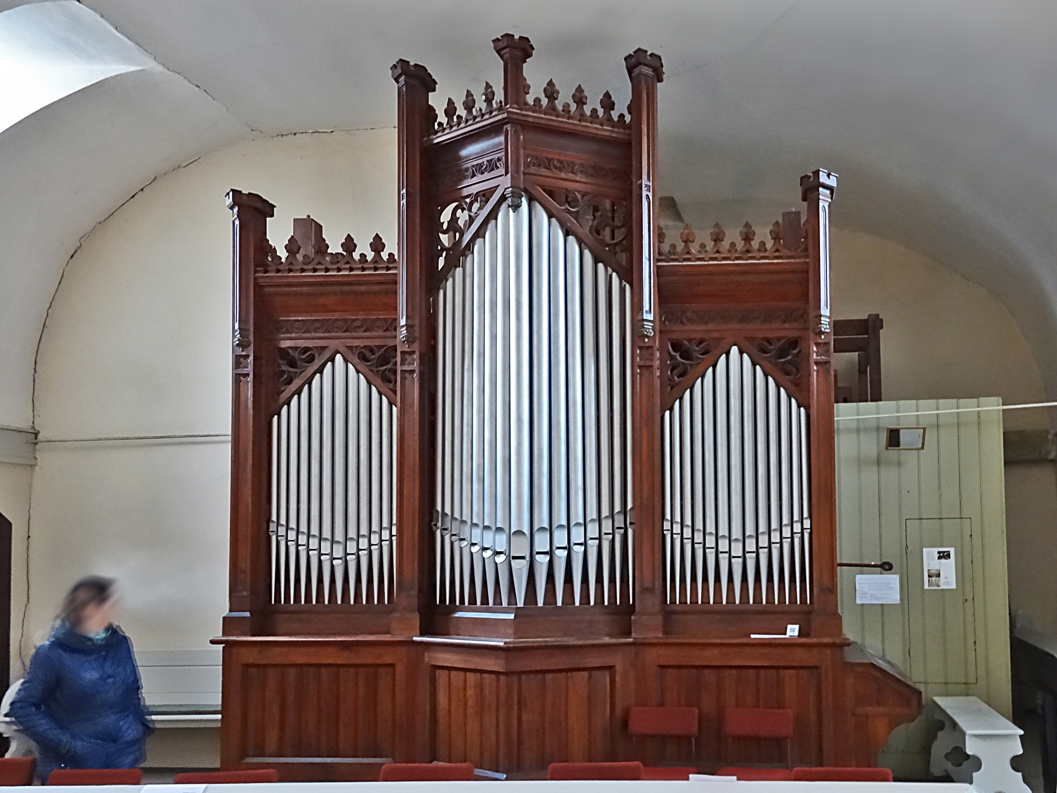 Orgel in St. Peter und Paul (Tiefthal) von Friedrich Ladegast & Sohn (1898 IIP/14)